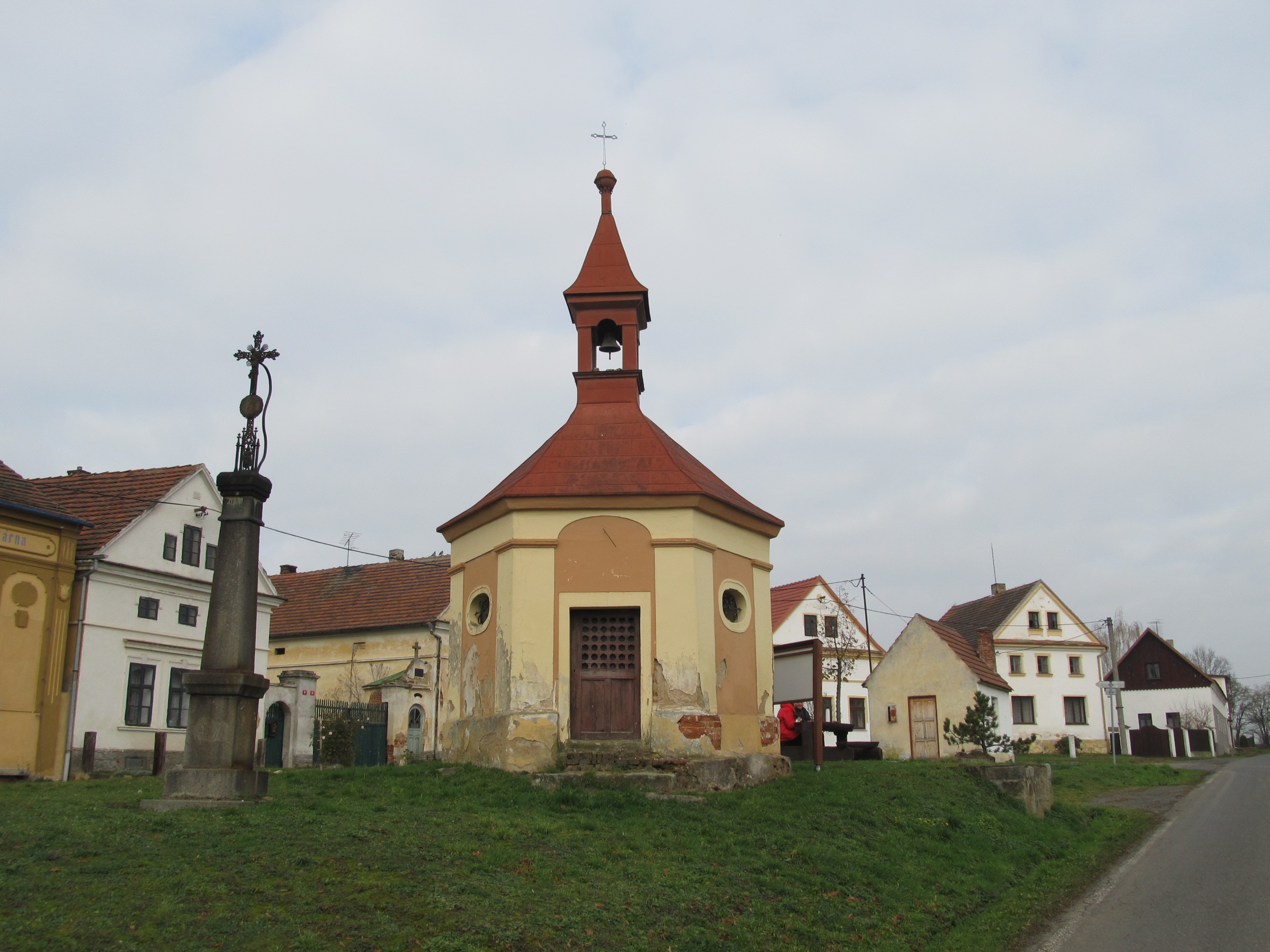 Černotín - náves